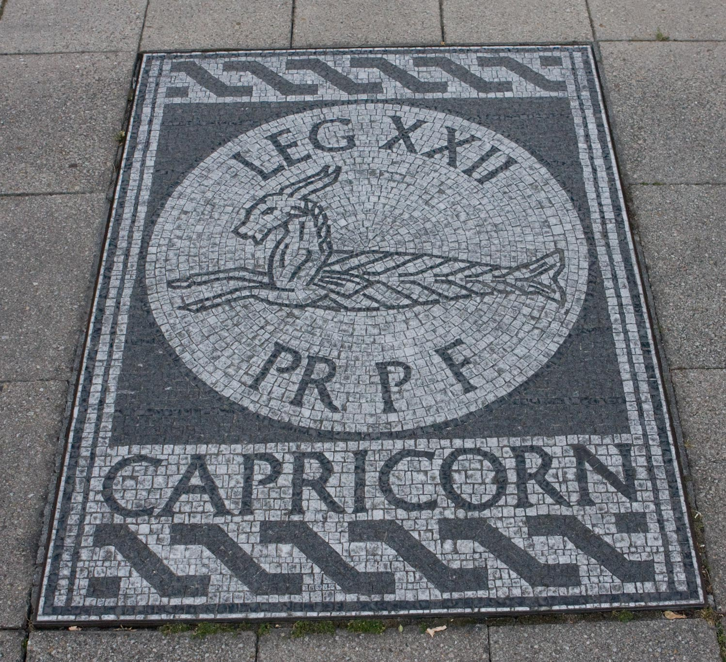 Abbildung des Wahrzeichens (Capricorn) der Legio XXII Primigenia in einem historisierenden Mosaik in der Wohnanlage Kästrich, Mainz.